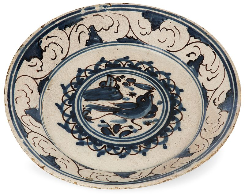 Portugal-faience-plat-rond-decor-dit-faixa-barroca XVIIIe